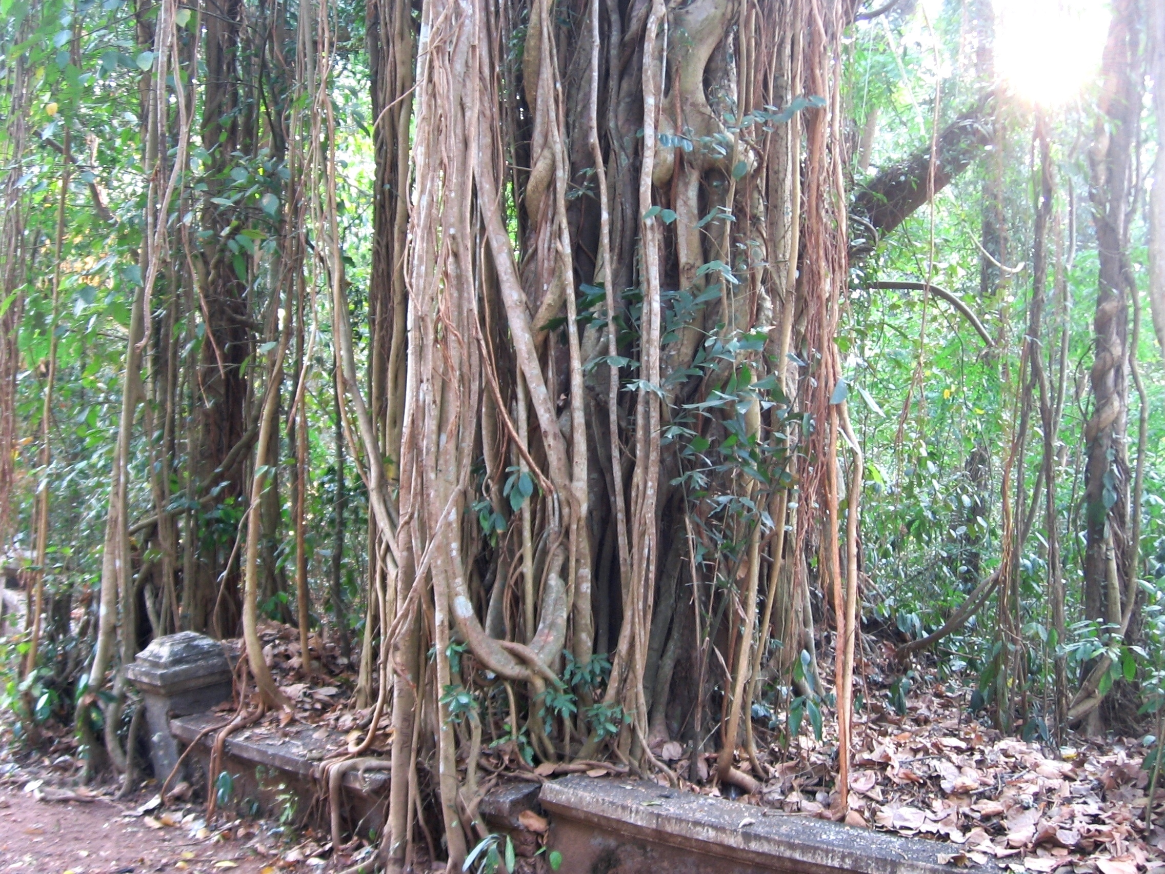 തൃപ്പൂണിത്തുറ ഹിൽ പാലസിലെ ആൽമരം